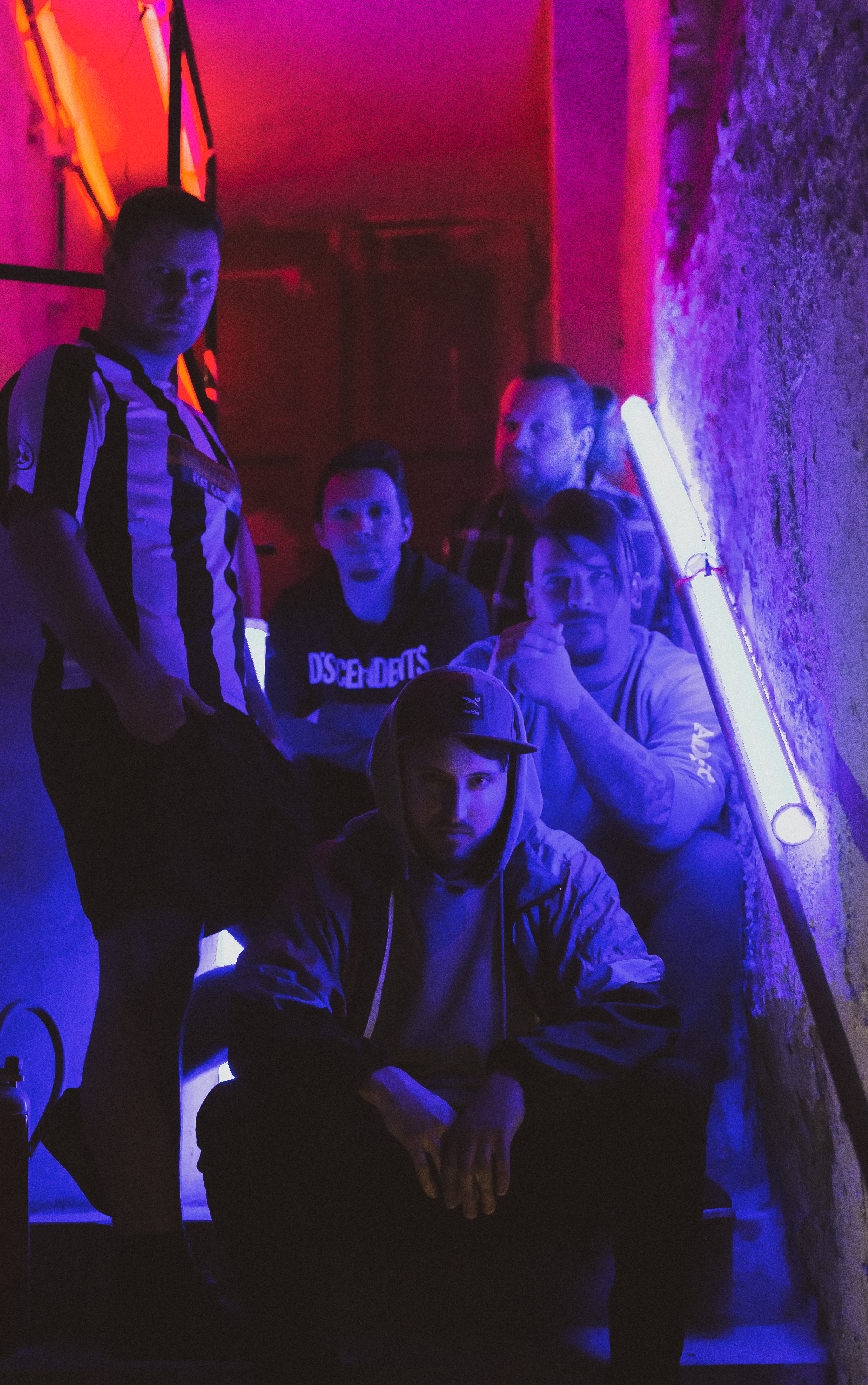 Alo!Stari - promo